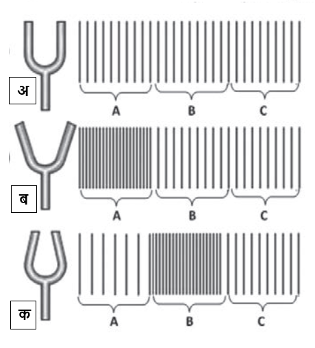 नादकाट्याद्वारे ध्वनीची निर्मिती